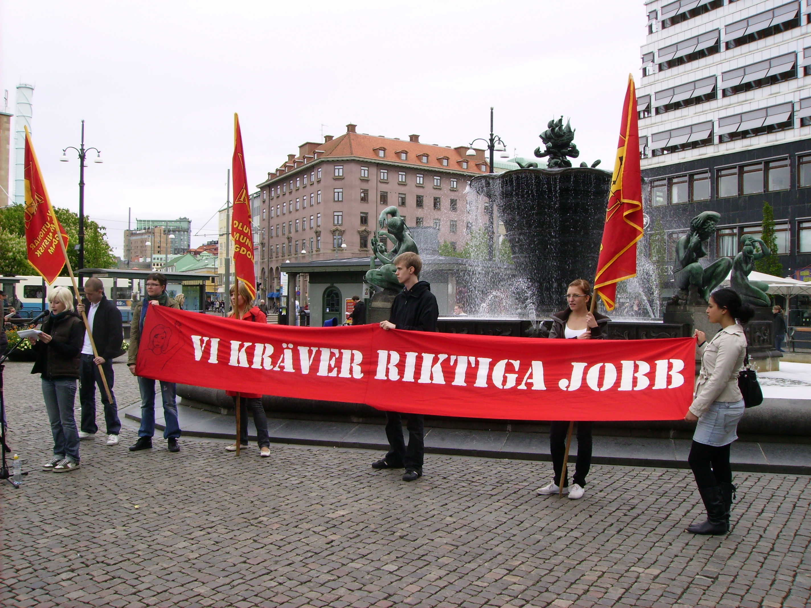 RKU på torgmöte